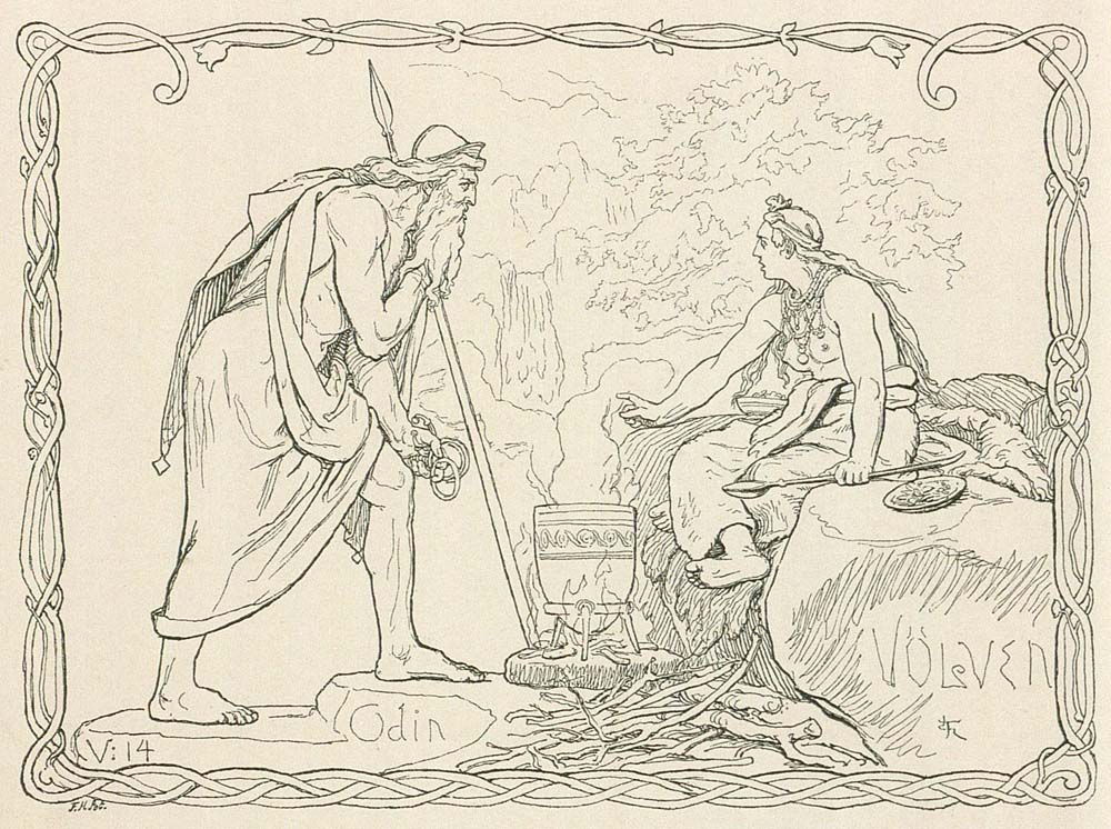 Odin og Vølven, illustration til Karl Gjellerups gendigtning af Den ældre Eddas Gudesange